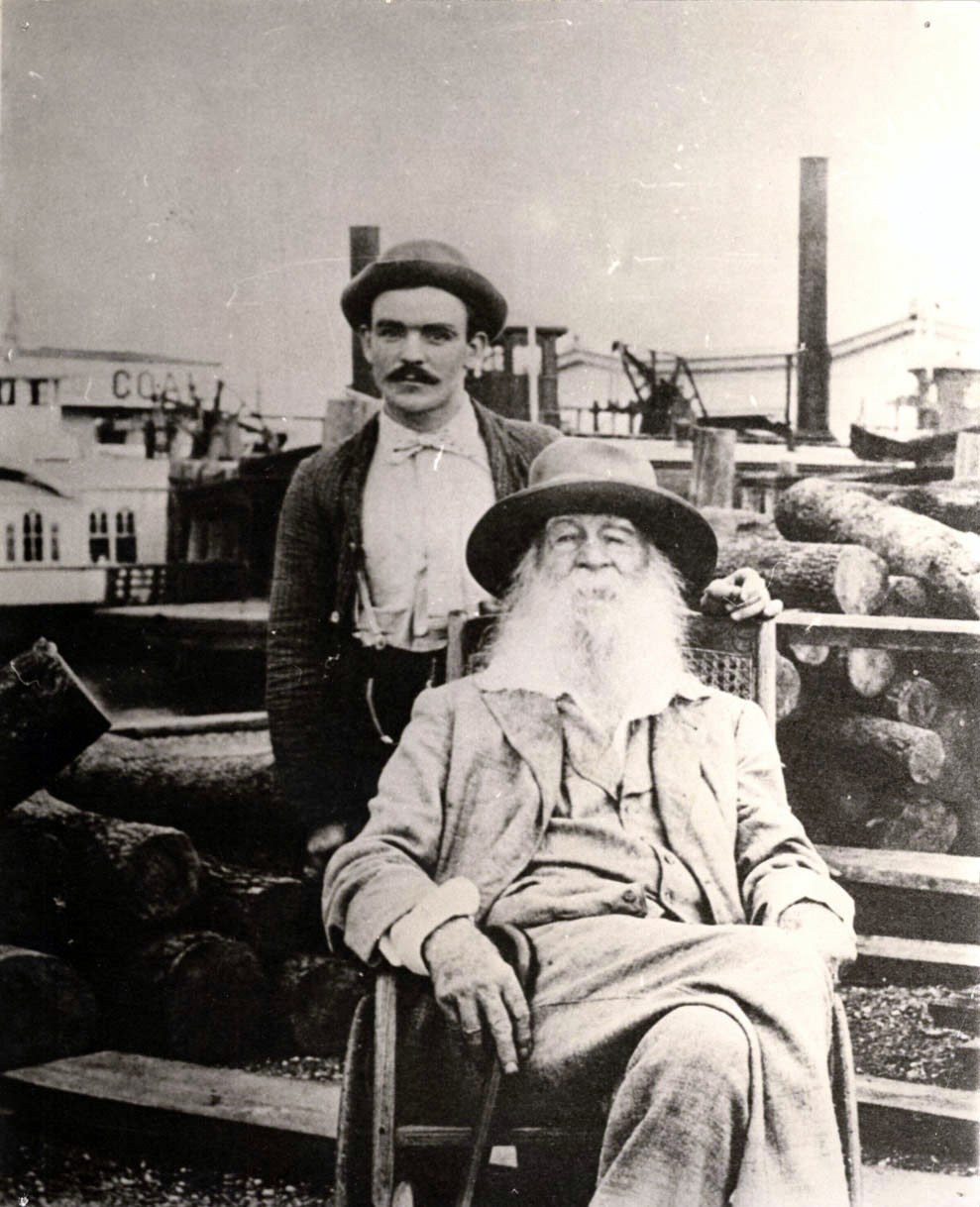 Walt Whitman and his male nurse Fritzenger